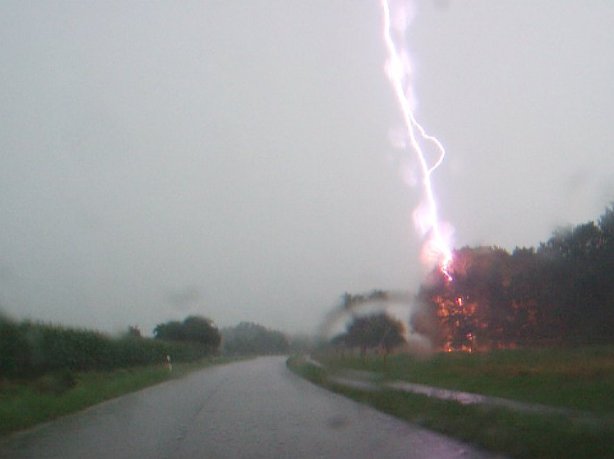 Nebenblitz schlägt in Baum ein